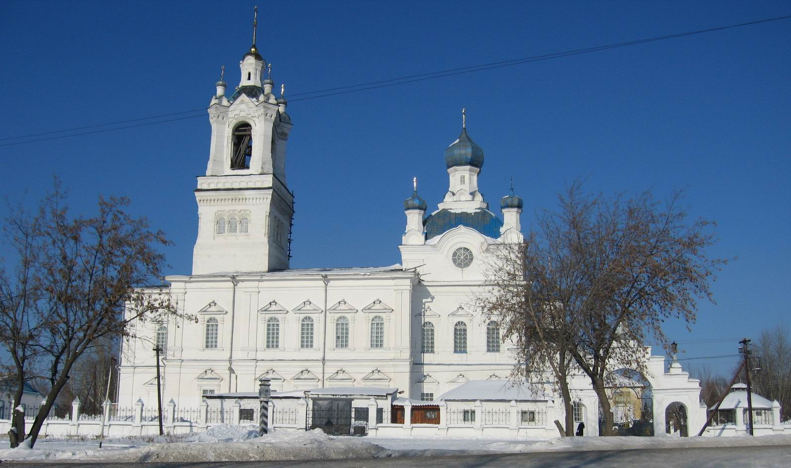 Камышловская церковь на западном въезде в город